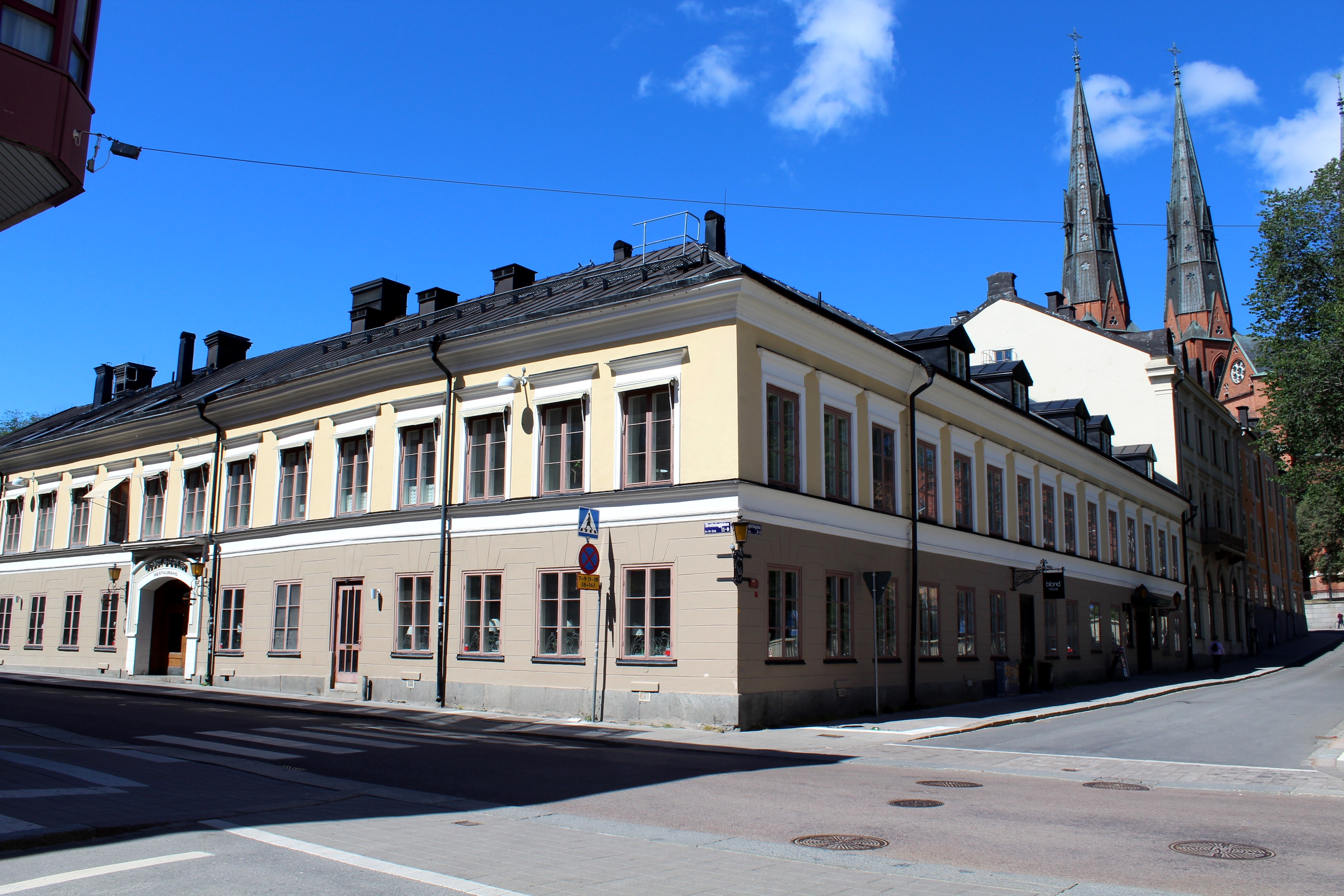 Byggnad i Uppsala, tidigare Uppsala stadshotell